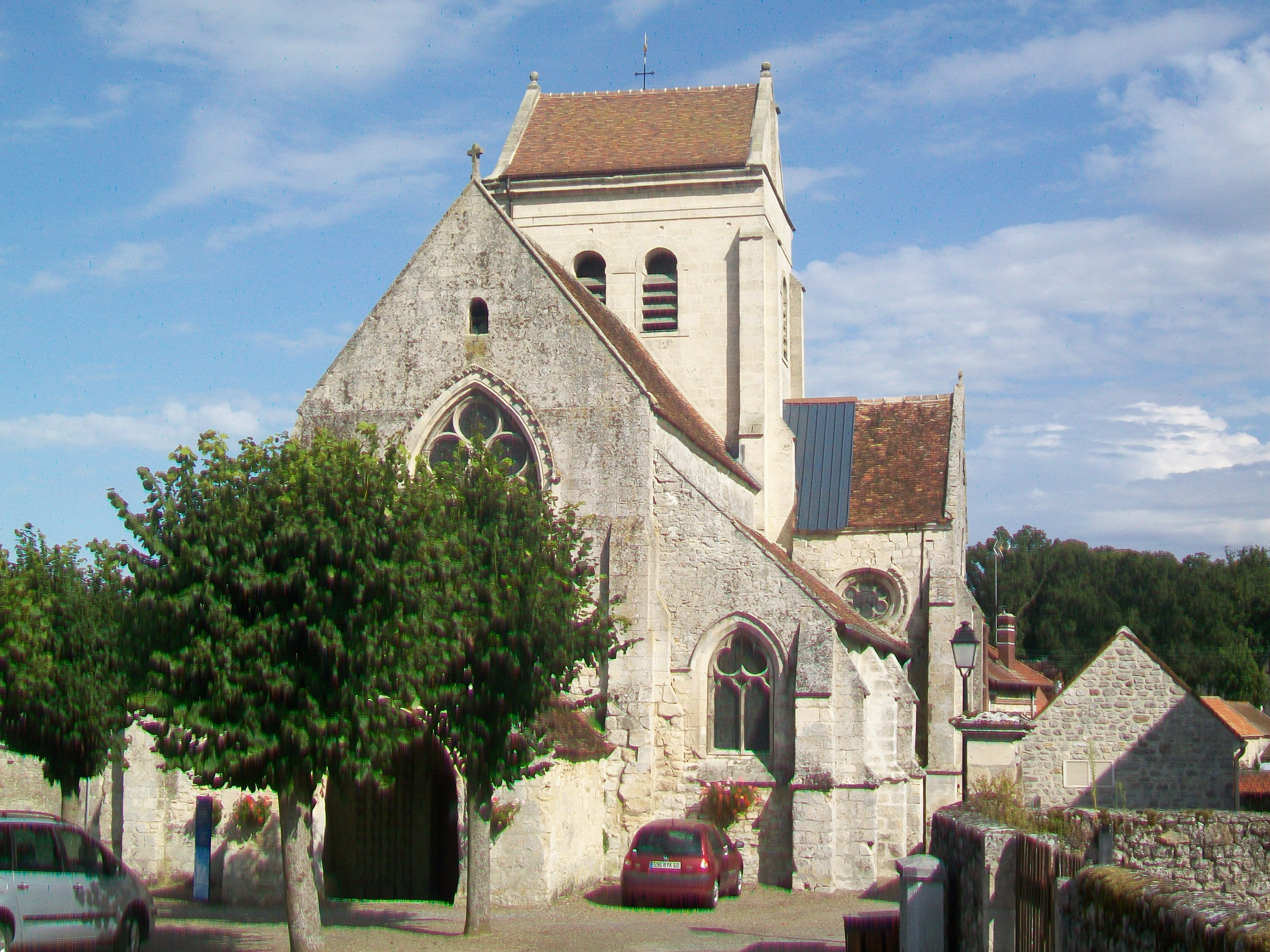 Vue d'ensemble depuis l'ouest.